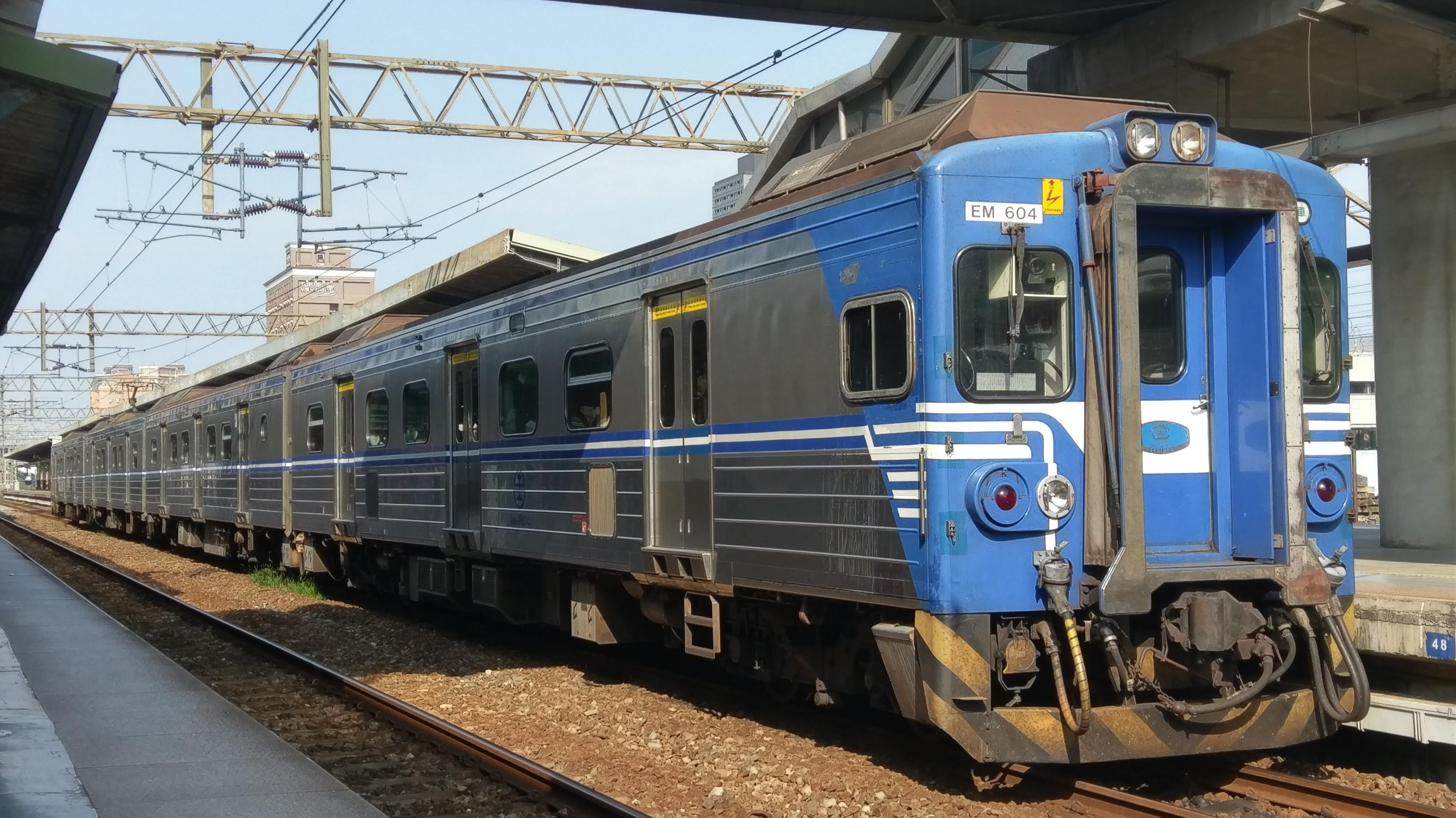 中文（台灣）: 臺灣鐵路管理局電聯車EMU604停靠新竹車站